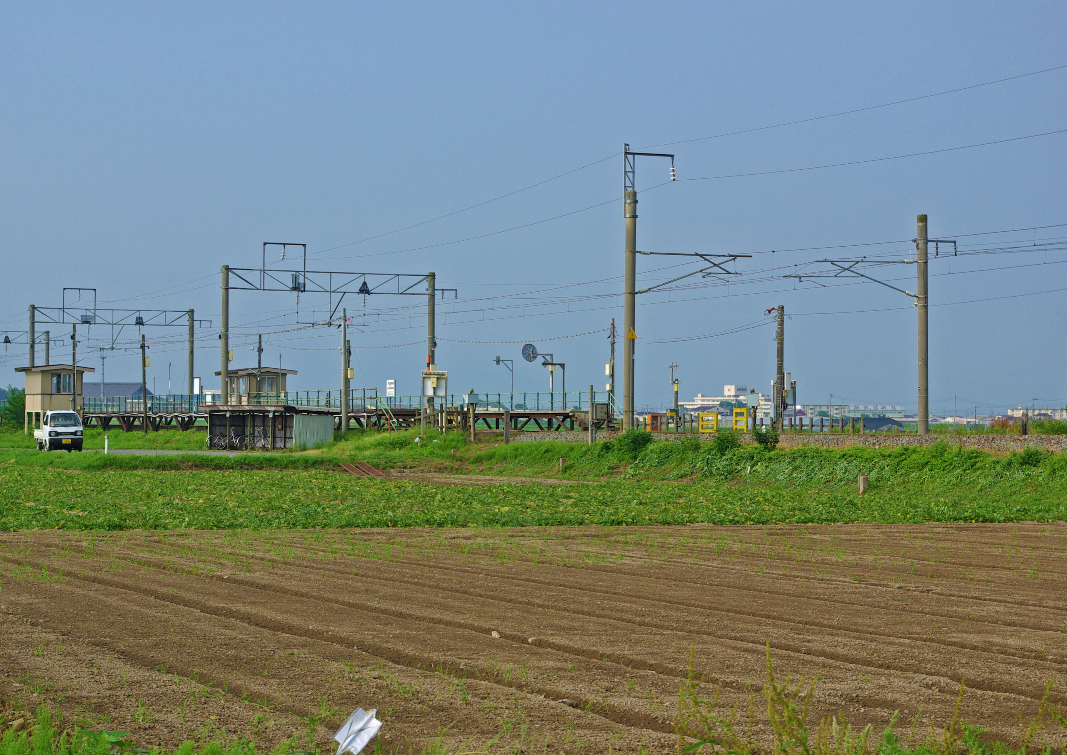 東日本旅客鉄道羽越本線北余目駅